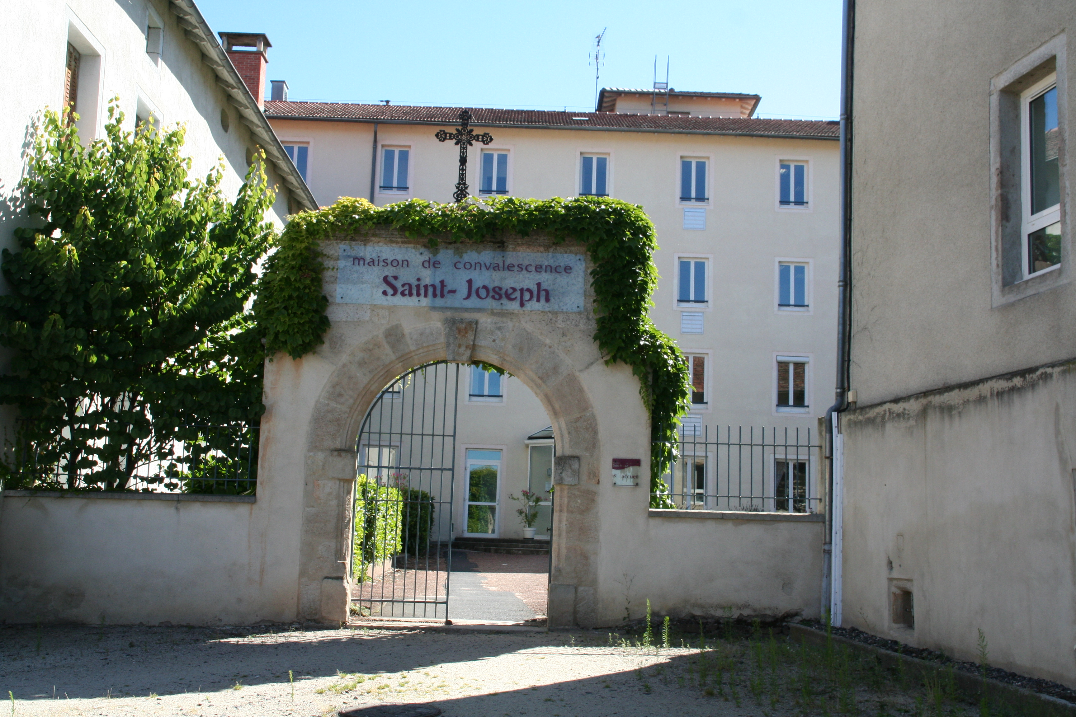 Maison de convalescence Saint-Joseph à Rosières